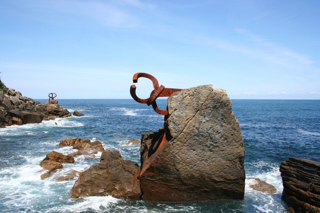 San Sebastian